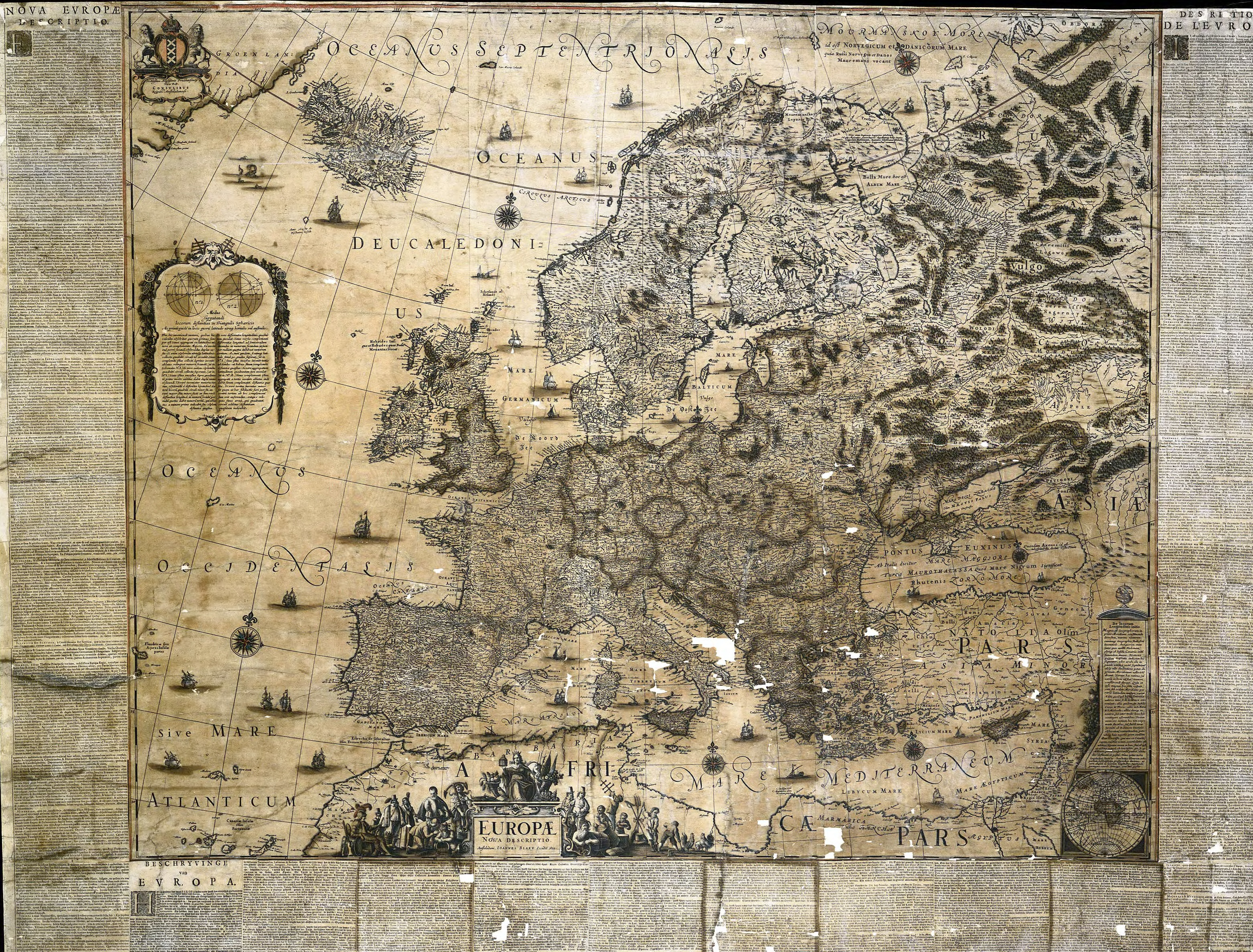 title=Europæ Nova Descriptio. Amstelerdam. Ioannes Blaeu Excudit 1659 size=ca. 118 x 156 cm